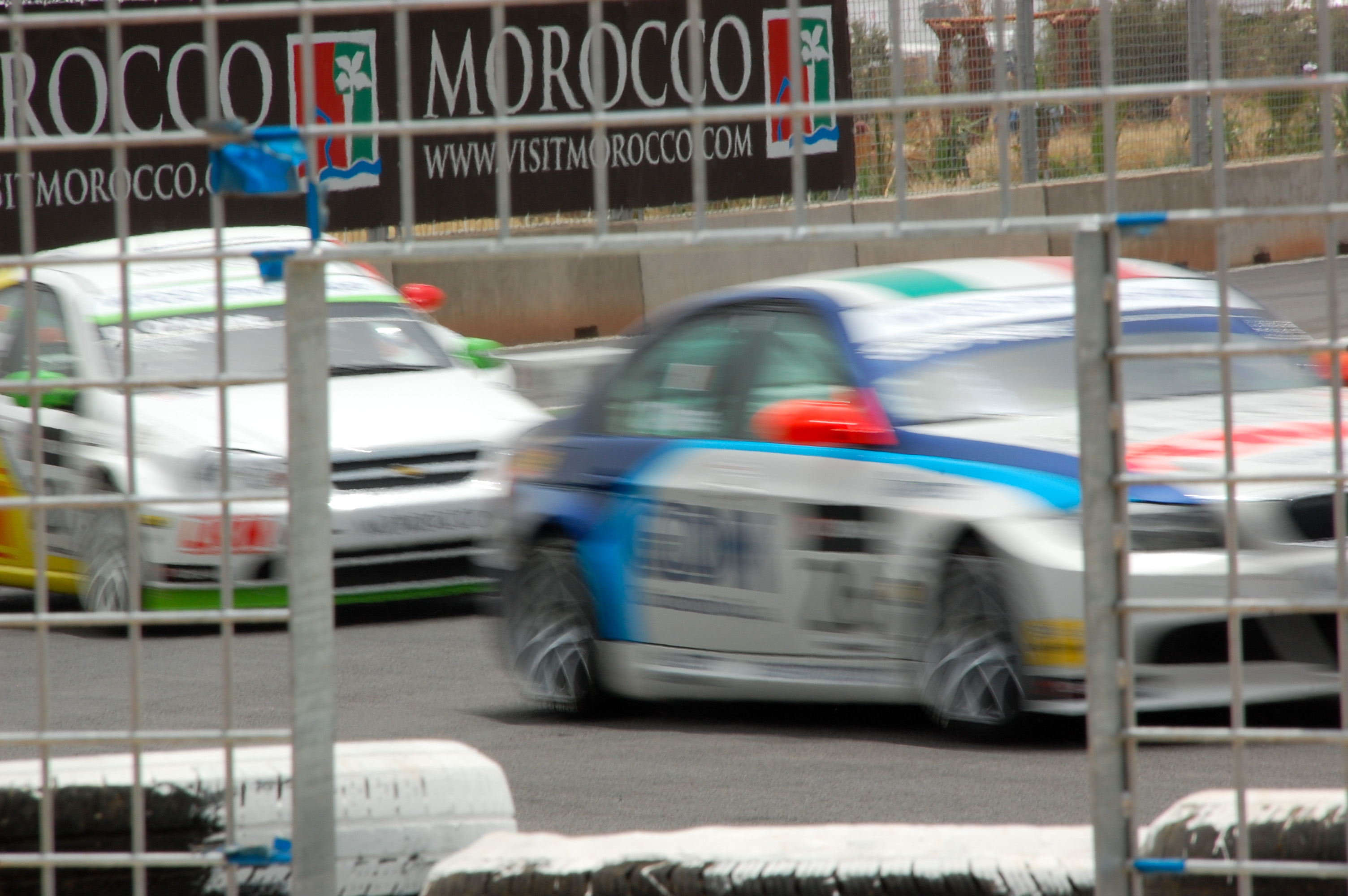 WTCC Morocco 2010